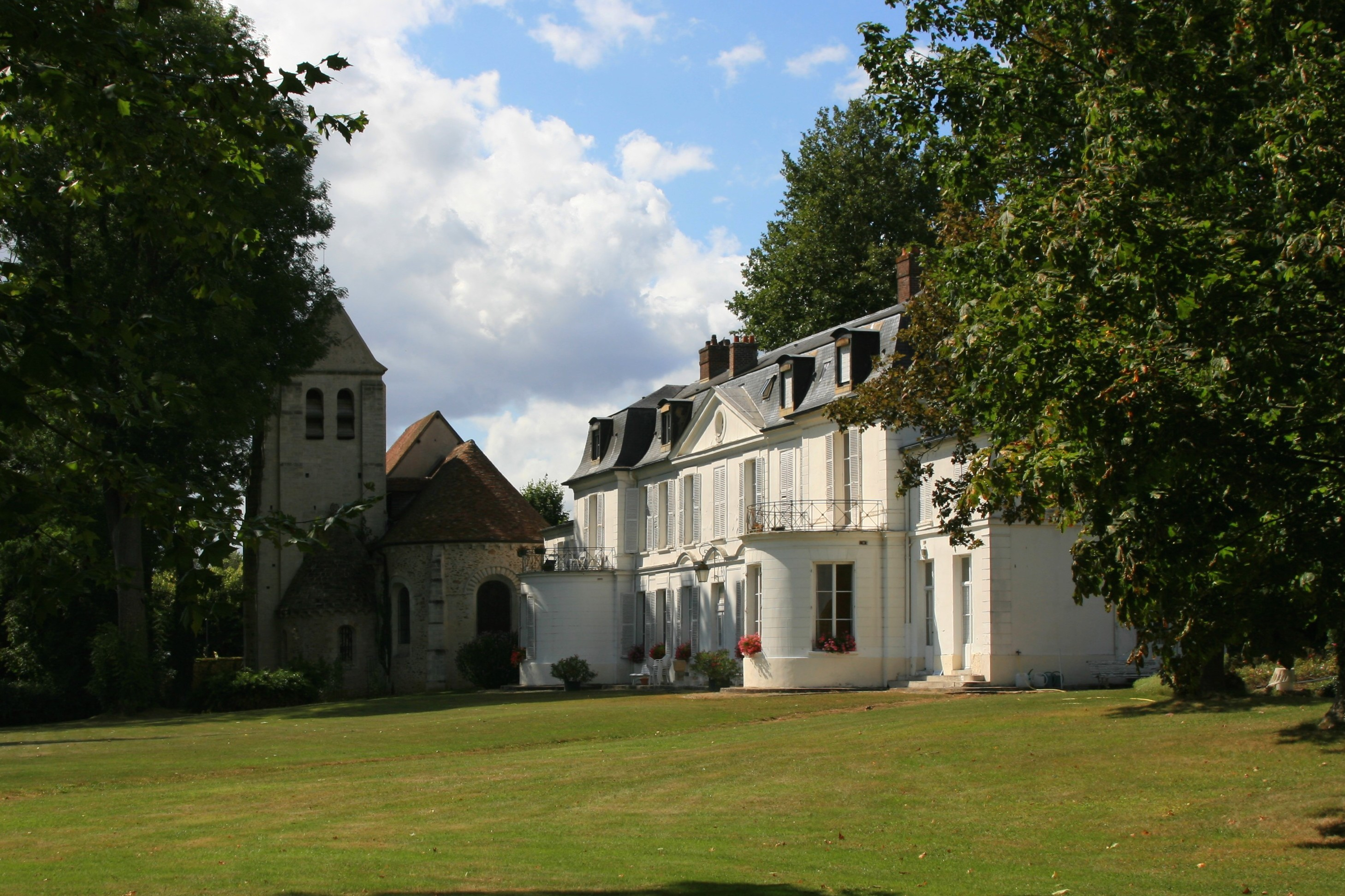 le Prieuré Saint Arnoult et l'Eglise Saint Julien de Brioude, Marolles en Brie (94), façades sud du Prieuré et de l'Eglise Saint Julien de Brioude, le clocher, le choeur et l'absidiole sud (IXème siècle, XIIème siècle) .